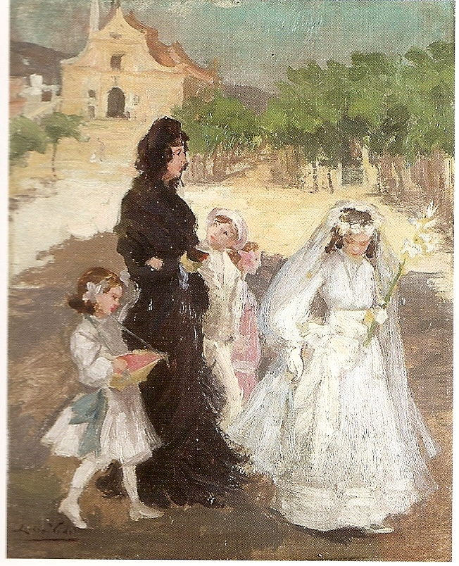 Catalan: Primera comunió